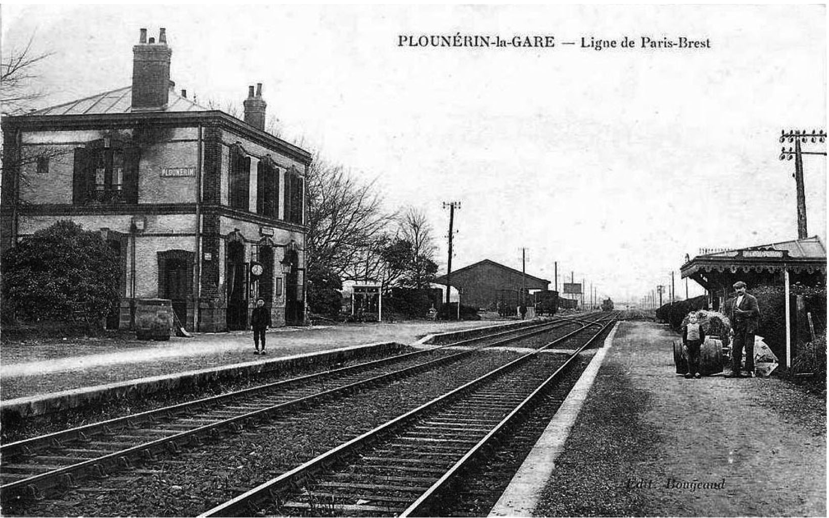 Carte postale du début des années 1900. Au centre les deux voies de la ligne de Paris à Brest avec en arrière plan le saut de la voie 1 à la voie 2. A gauche l'ancien bâtiment voyageurs (disparu) et la halle à marchandise (un hangar existe à son emplacement). À droite un abri de quai (disparu).